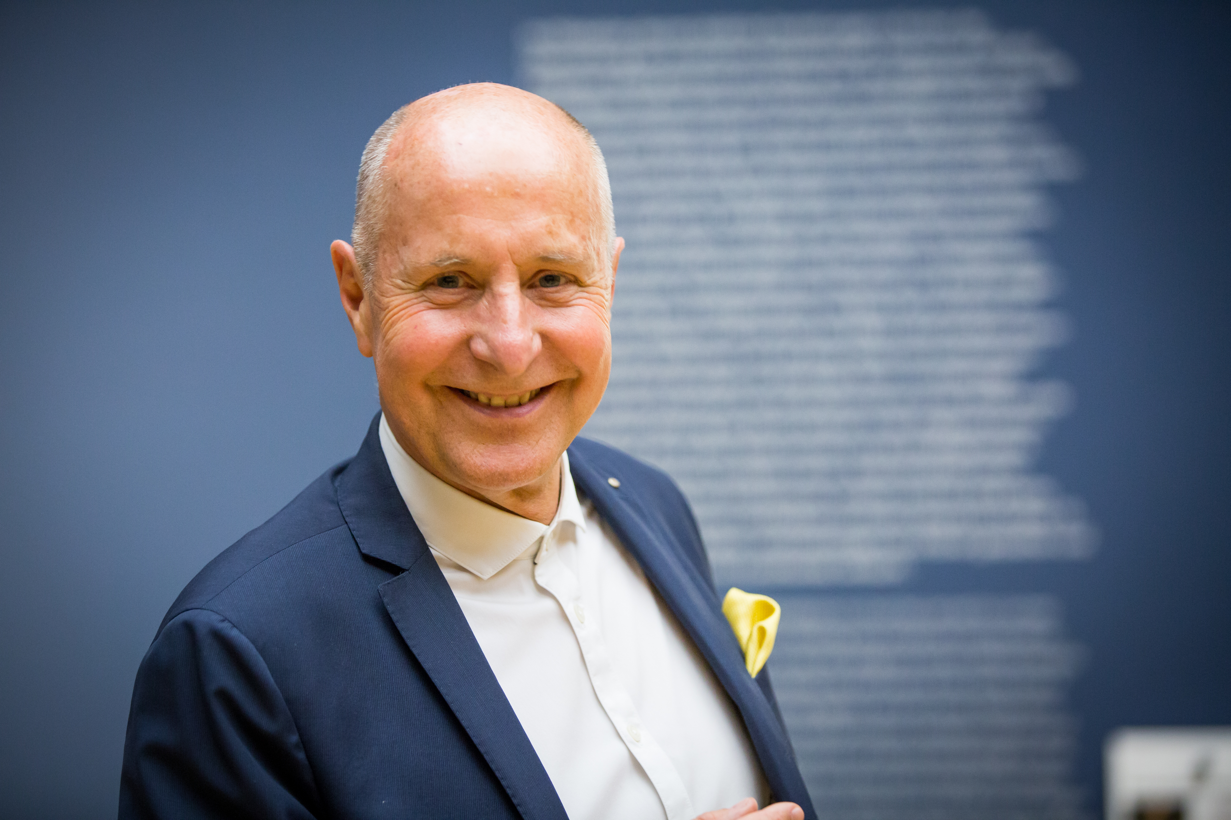 Porträt Verleger Wolfgang E. Buss